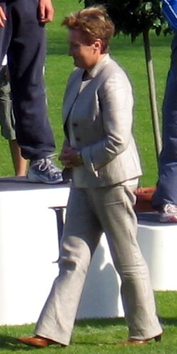 Aino-Maija Luukkonen jakamassa palkintoja yleisurheilun 22-vuotiaiden SM-kisoissa Porin stadionilla